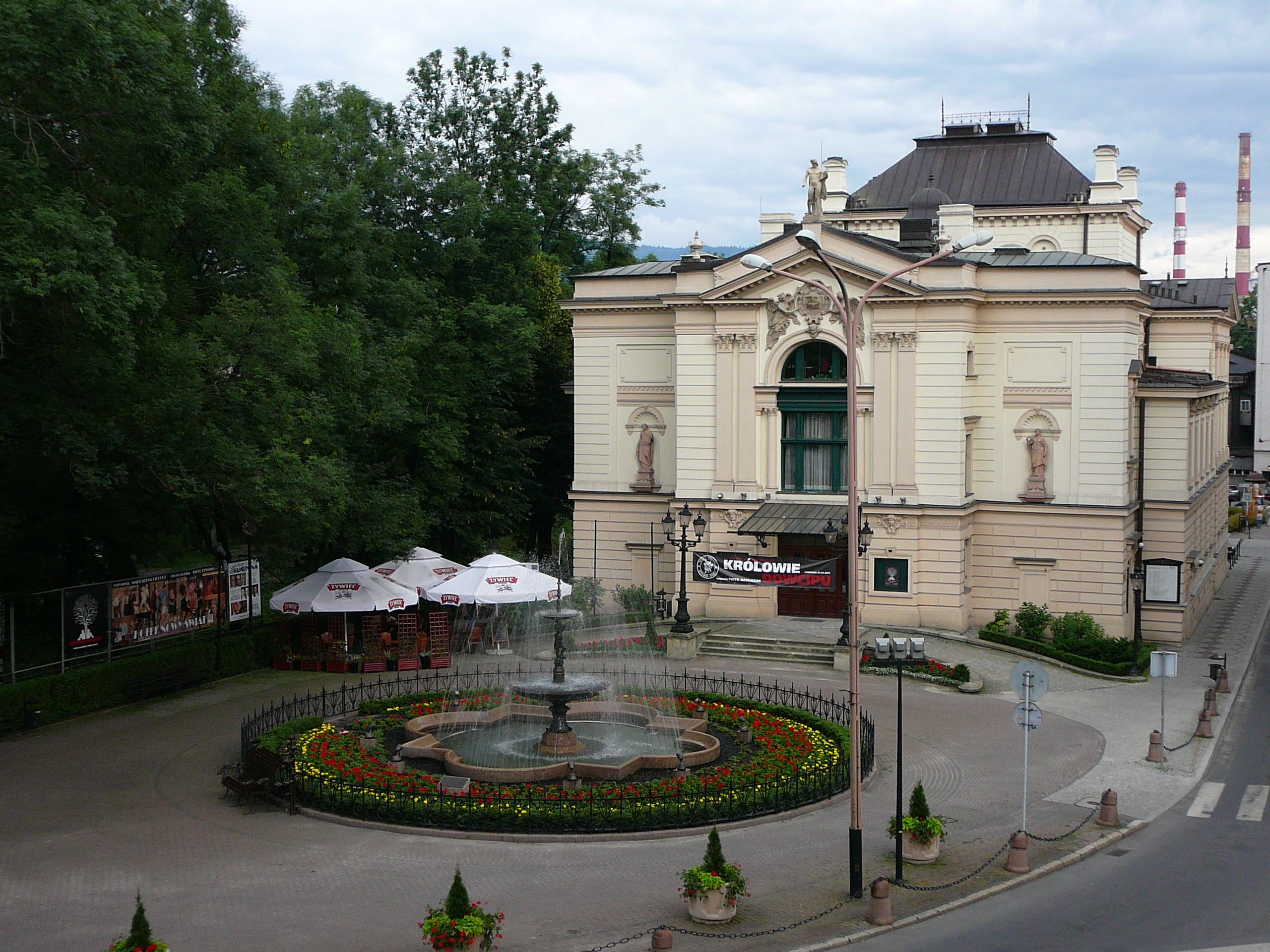 Bielsko-Biała, Teatr Polski, 1888-1890, 1905